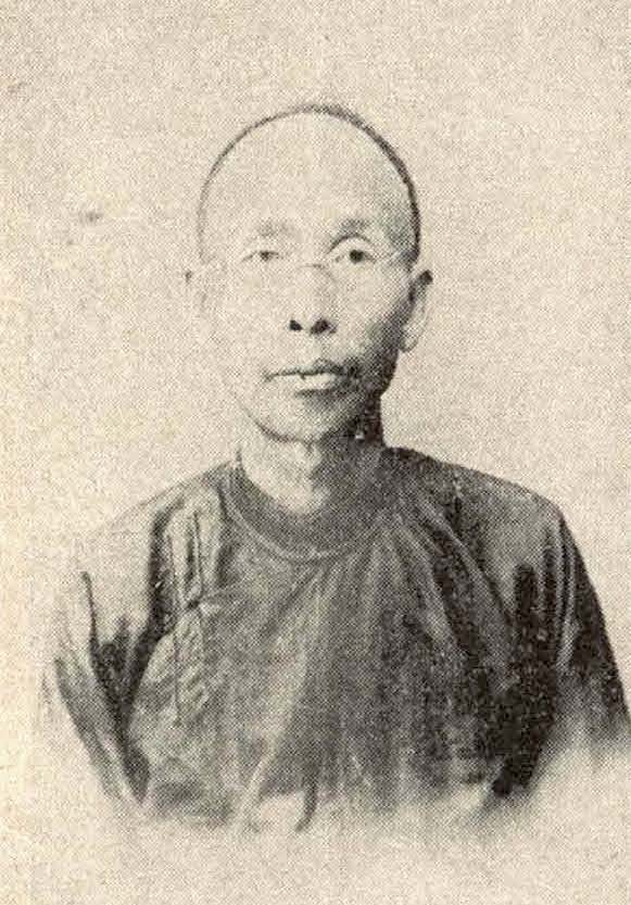 Bân-lâm-gú: 盧經堂 Lô͘ Keng-tông